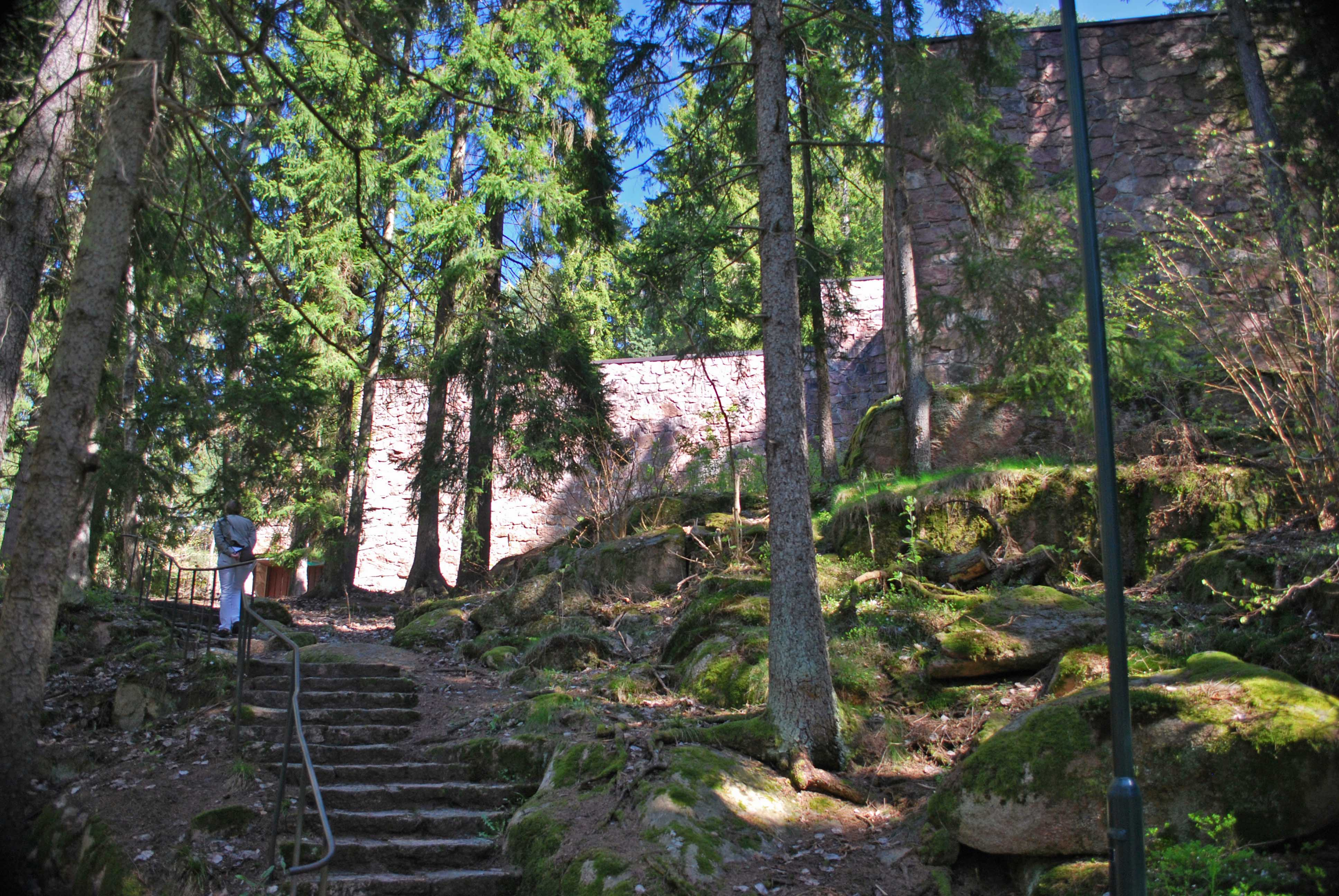 Holmsbu Billedgalleri, sett fra stien med adkomst